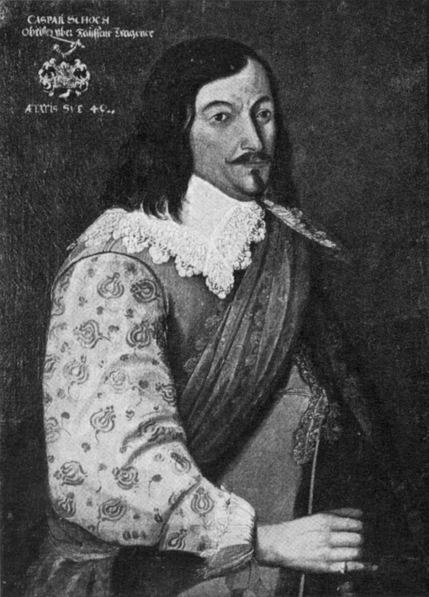 Bildnis des Obristen Caspar Schoch